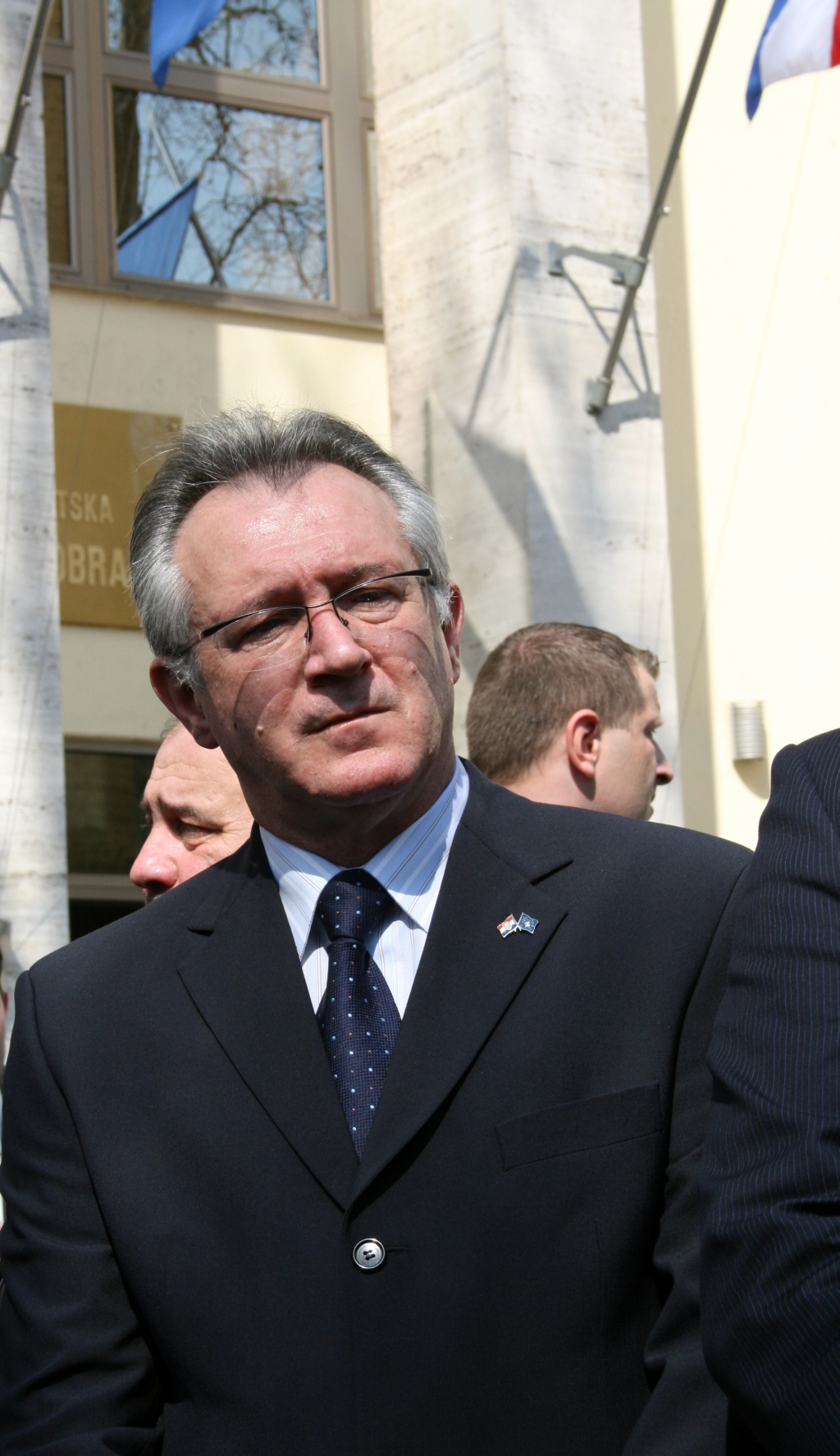 Branko Vukelić (svečanost podizanja NATO-ve zastave ispred zgrade MORH-a u Zagrebu.)